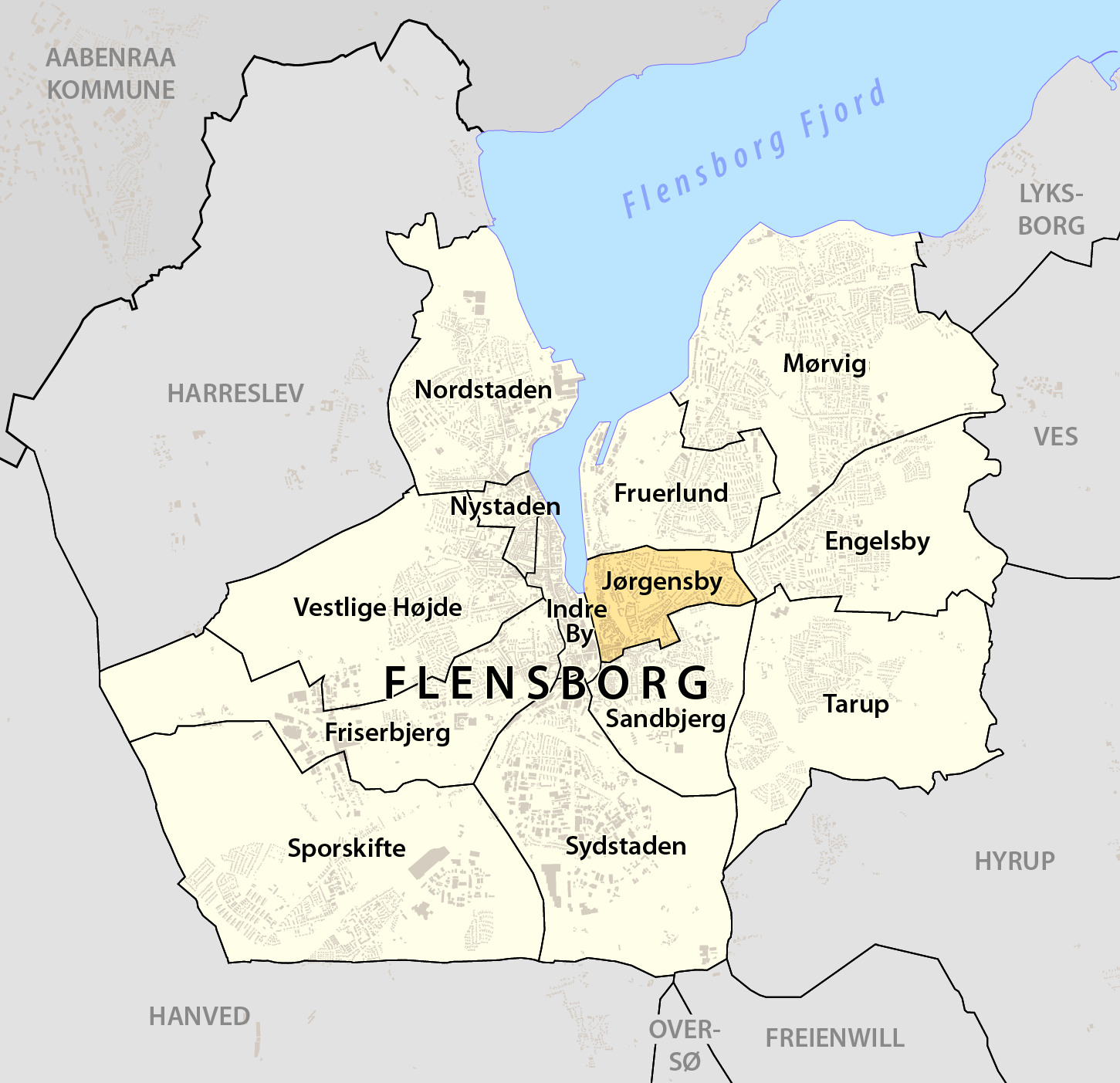 Beliggendhed af Jørgensby i Flensborg Kommune